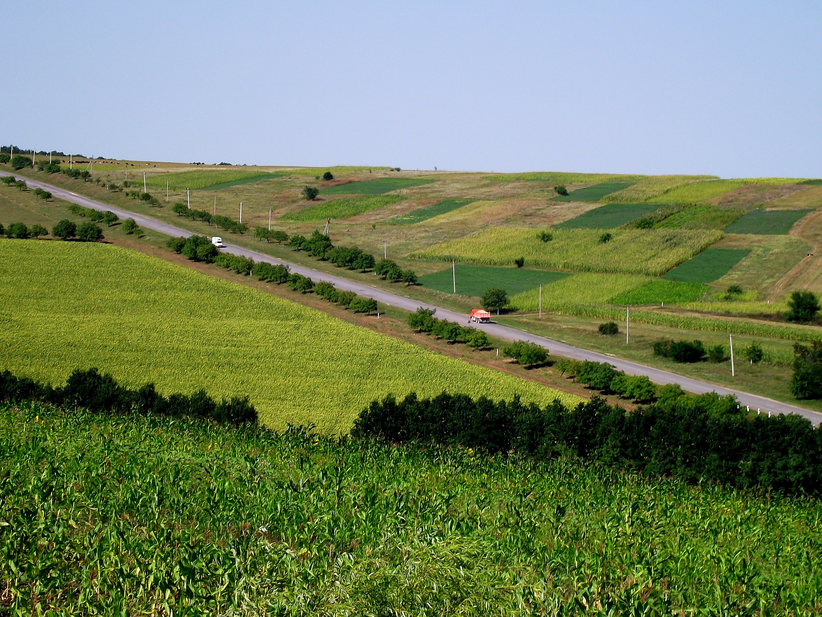 Ciniseuti, Moldova